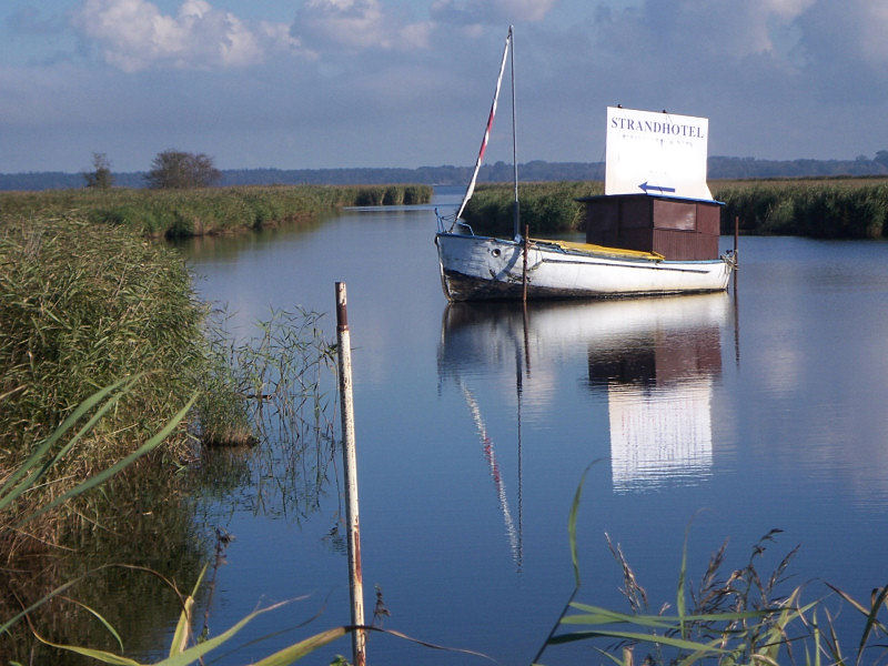 Anfang des nie fertig gestellten Küstenkanals am Saaler Bodden zwischen Dändorf und Hof Körkwitz.